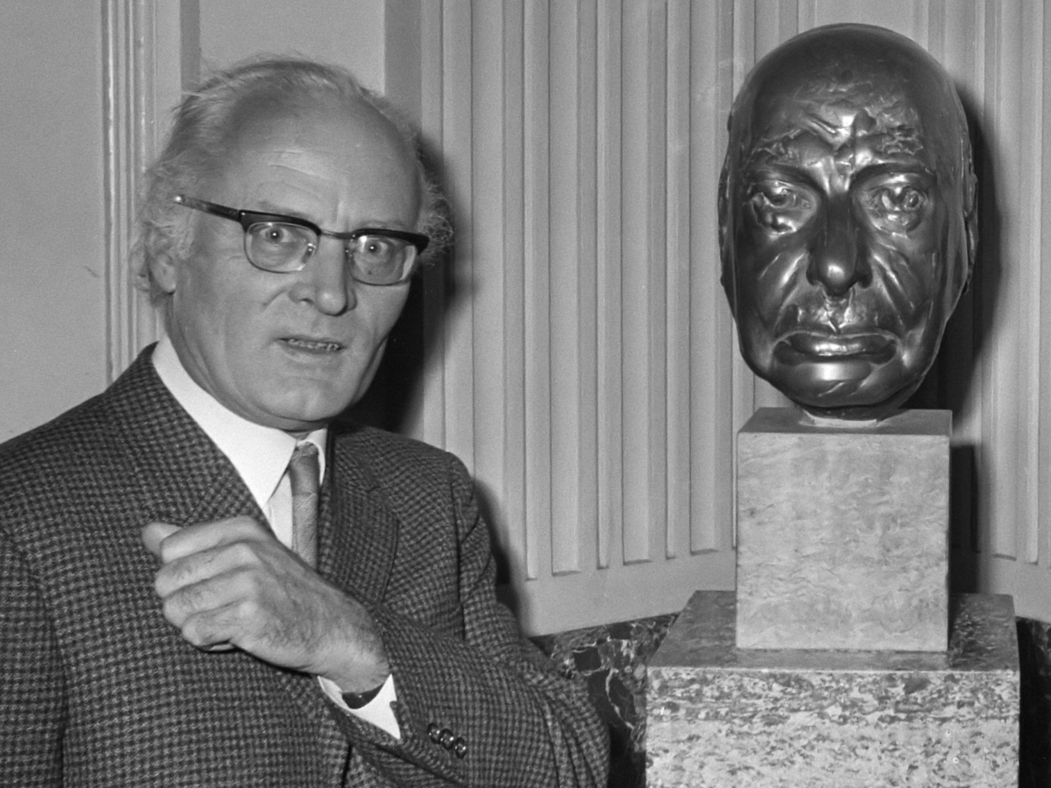 Nieuwe kunstwerken in Stadsschouwburg, Amsterdam; bronzen kop van Albert van Dalsum met links de beeldhouwer prof. V. P. S. Esser 28 oktober 1970